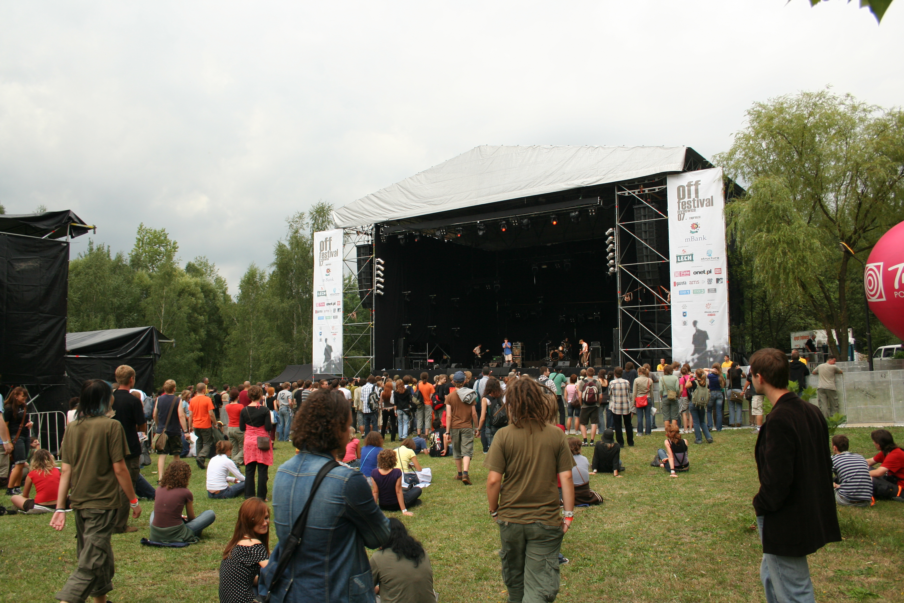 Off Festival, Mysłowice - duża scena